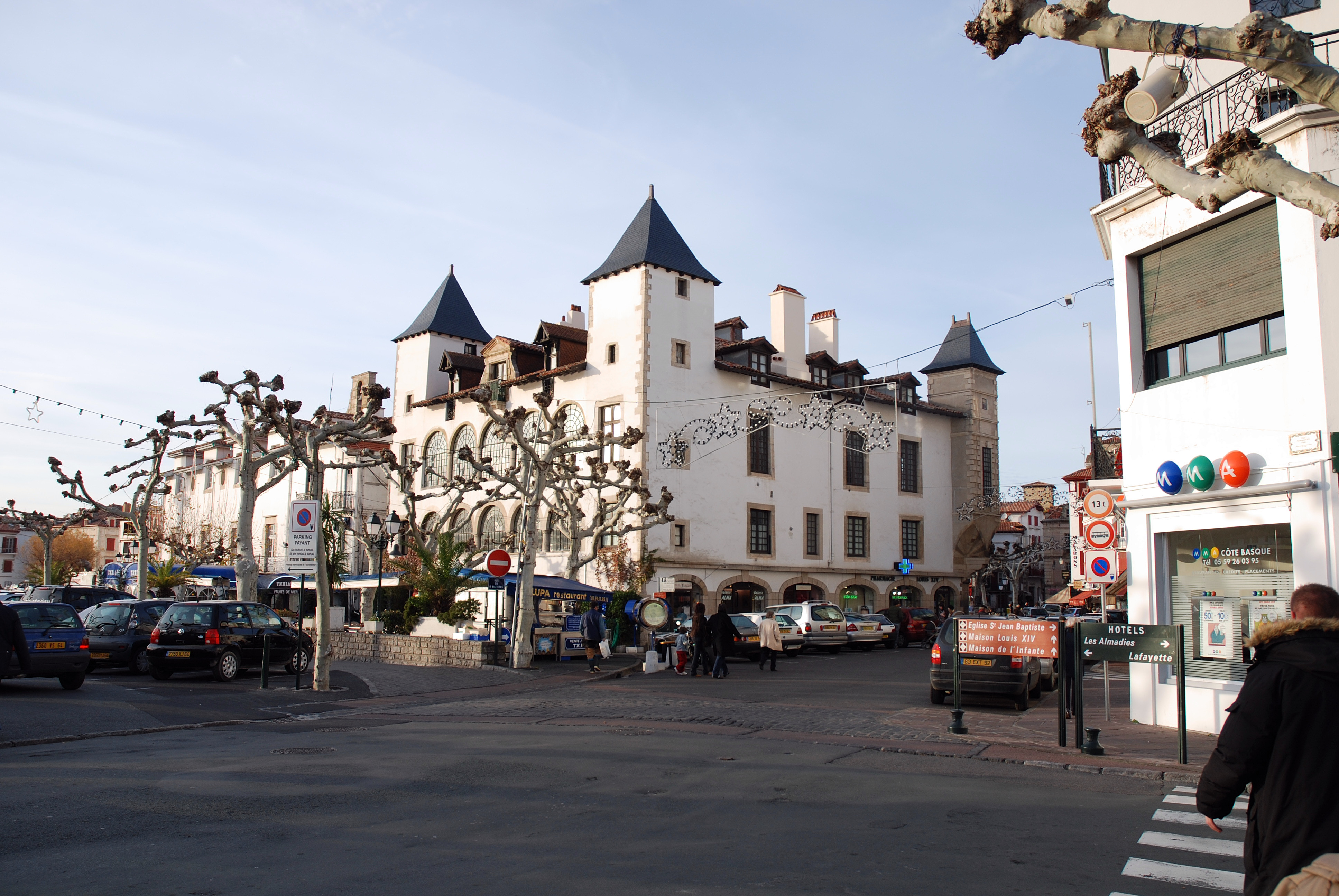 Saint-Jean-de-Luz, ancienne maison qui accueillit Louis XIV. Photo prise le 03/01/07 par Harrieta171